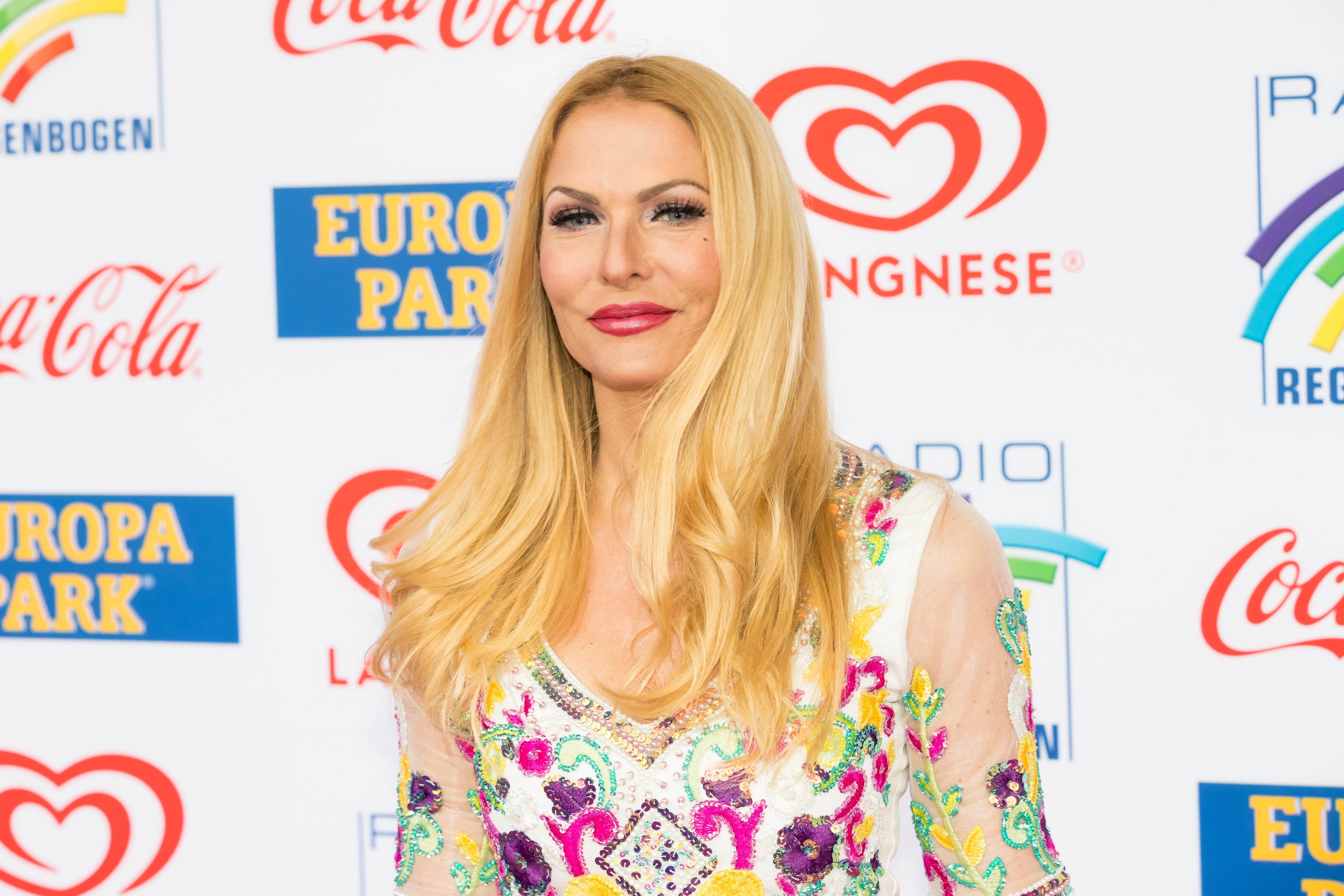 Sonya Kraus during Radio Regenbogen Award 2019 at Europapark, Rust, Baden-Württemberg, Germany on 2019-04-12, Photo: Sven Mandel